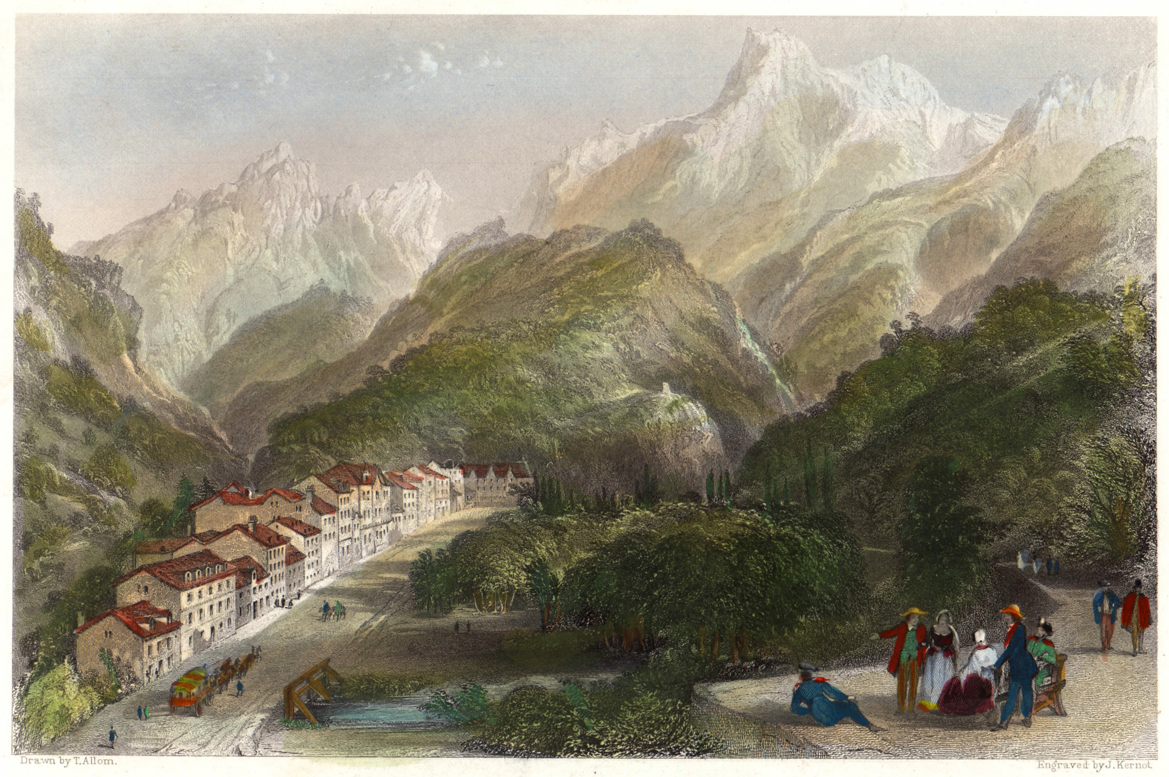 Eaux-Bonnes, Pyrénées Atlantiques, France 6 Gravure de Thomas Allom, circa 1840.